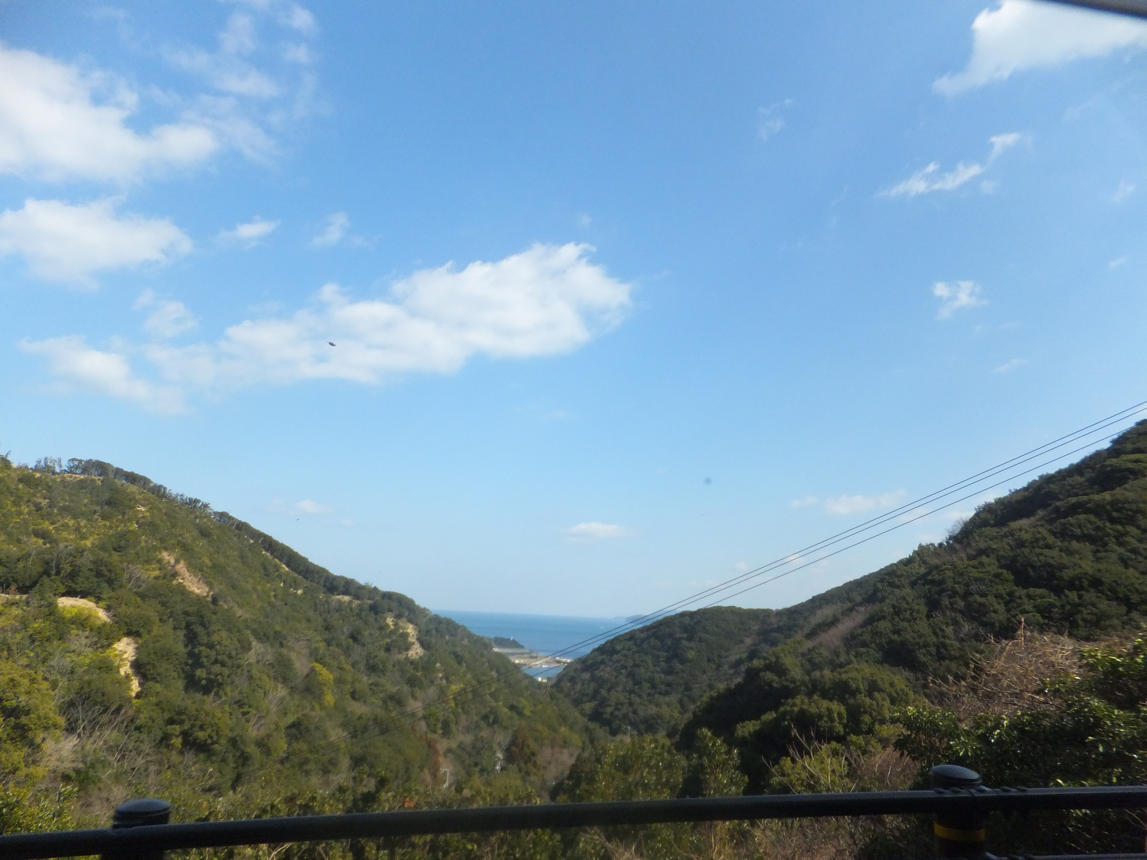 兵庫県洲本市由良町由良 大阪湾